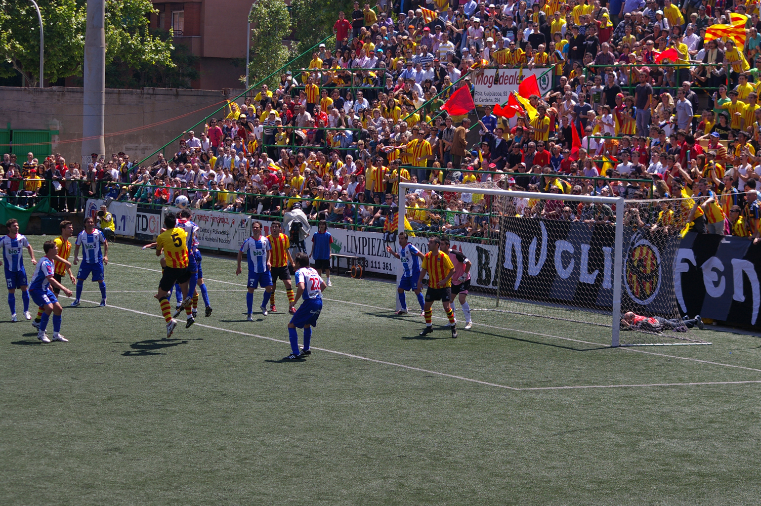 UE Sant Andreu - SD Ponferradina, partit d'anada de la promoció d'ascens a 2ª divisió A a l'estadi Narcís Sala.